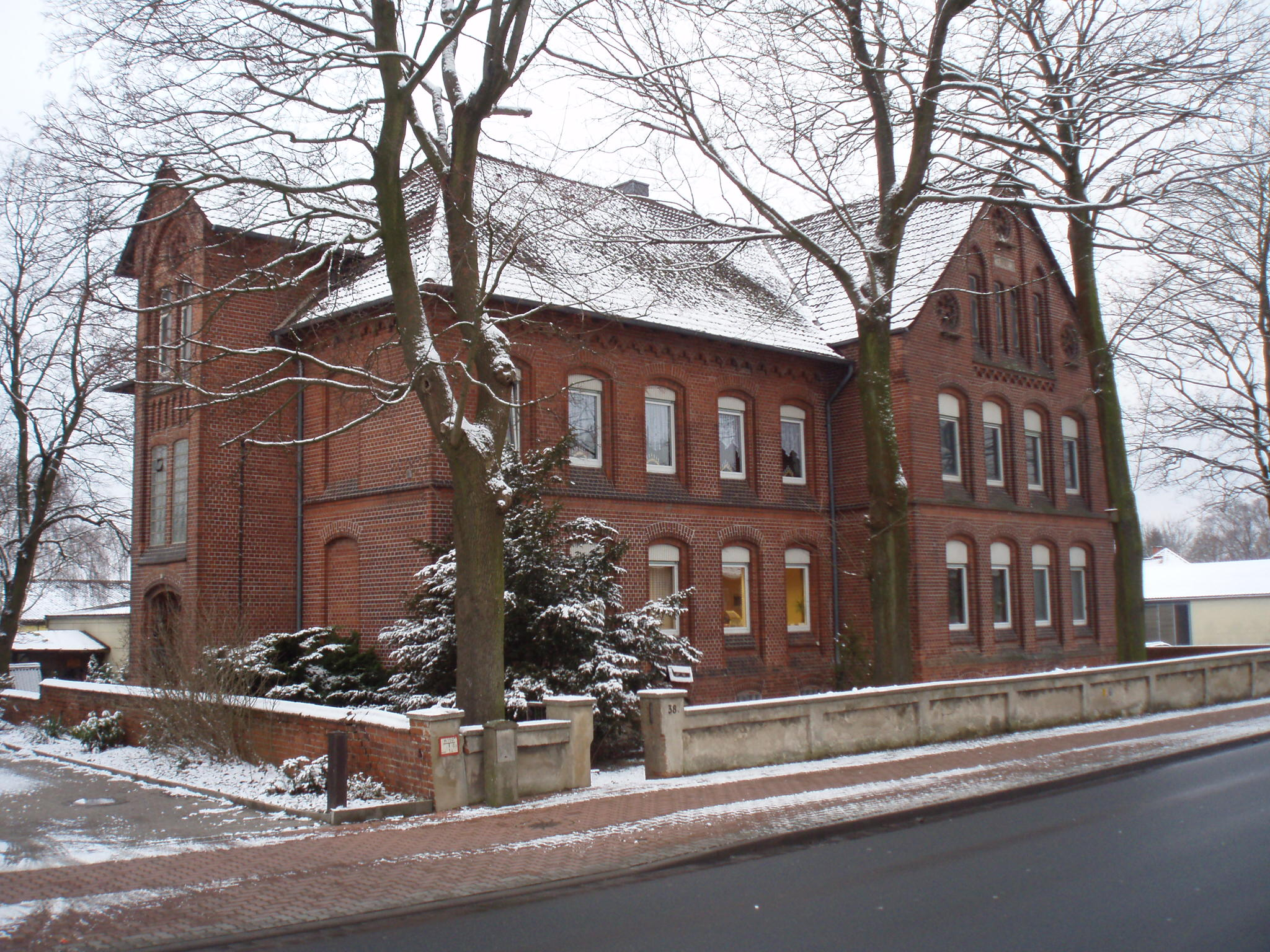 Gebäude der Alten Schule Ahlten, welches heute das Bürogebäude der Firma GEMU Werk GmbH beherbergt.